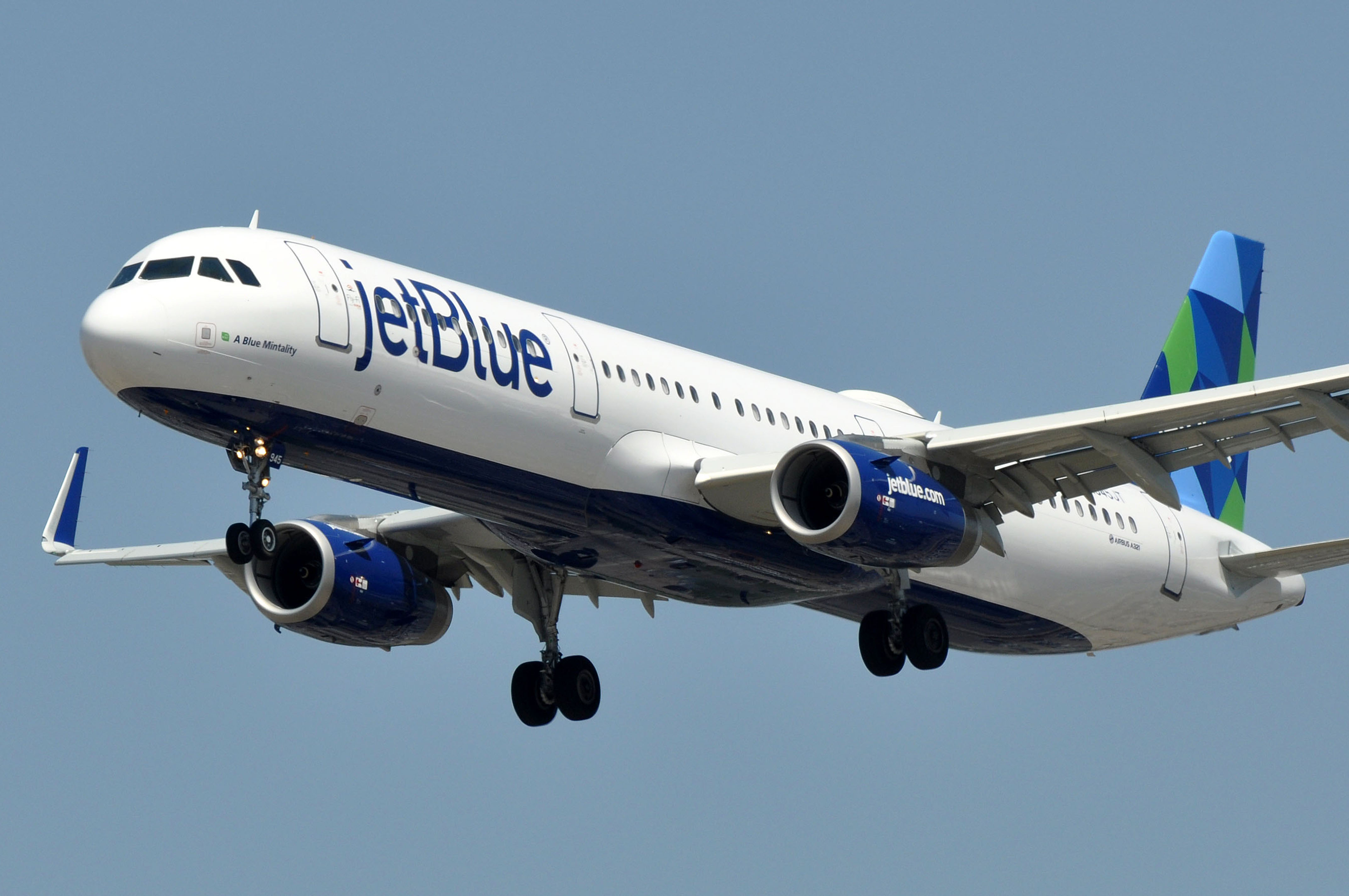 MSN 6390 A321-231 JETBLUE AIRWAYS LAX AIRPORT